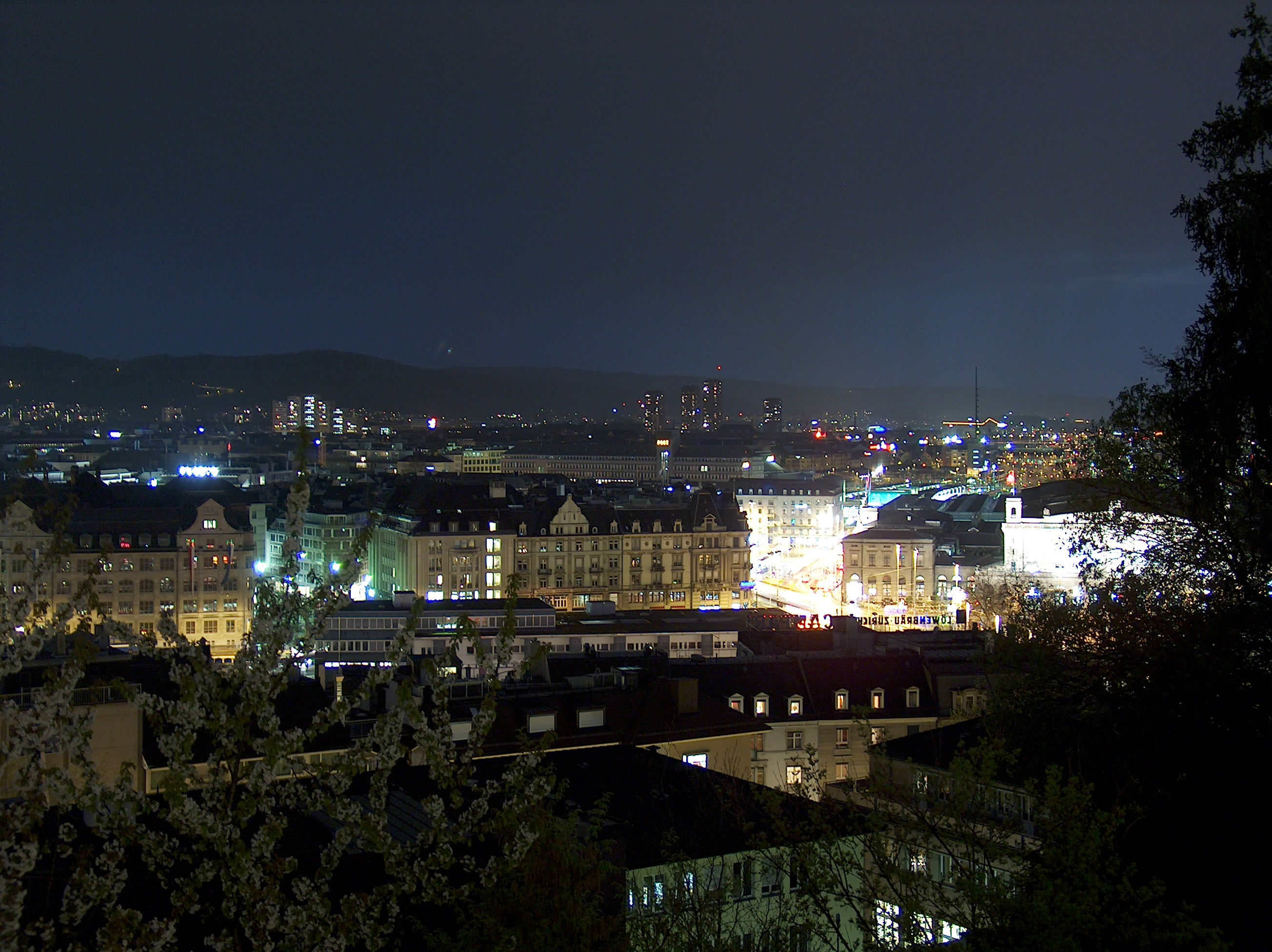 Zürich bei Nacht. Aufgenommen von der Polyterrasse mit Blick nach Westen. Zürich, Schweiz.